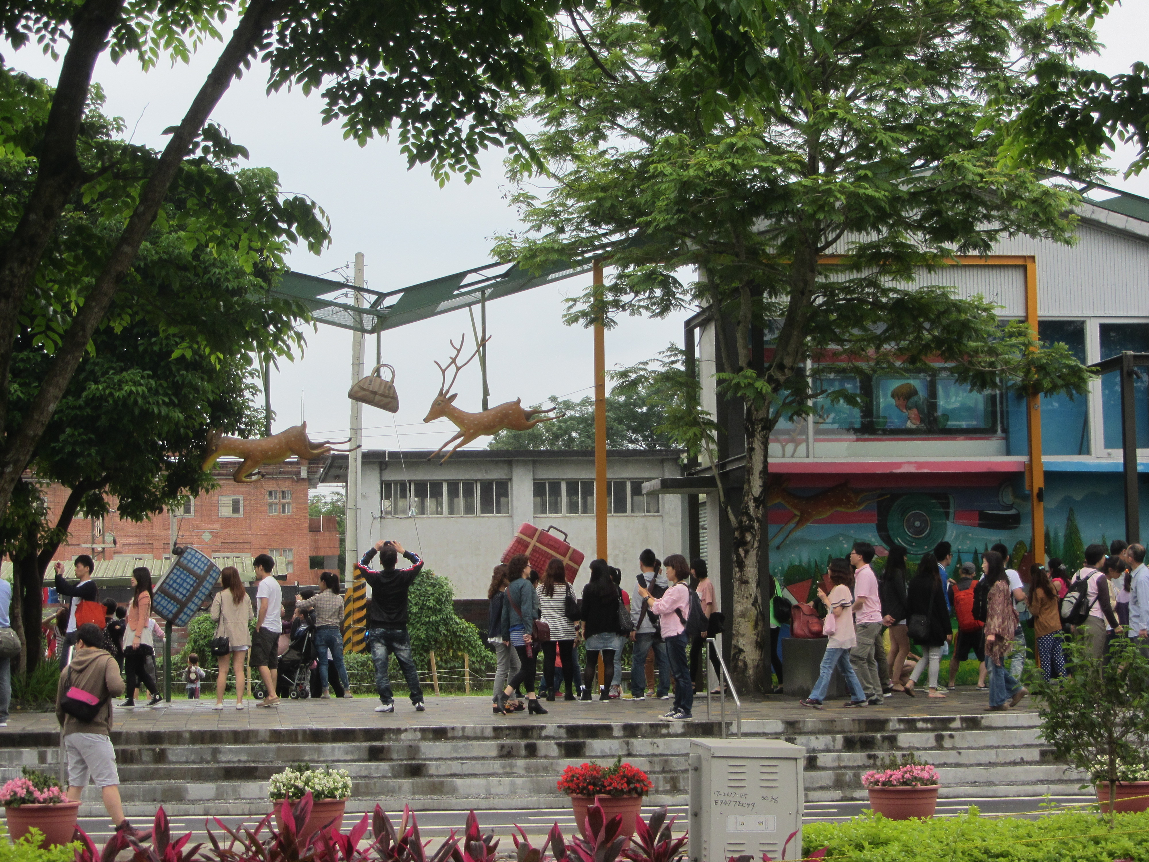 宜蘭縣宜蘭市幾米廣場一景。